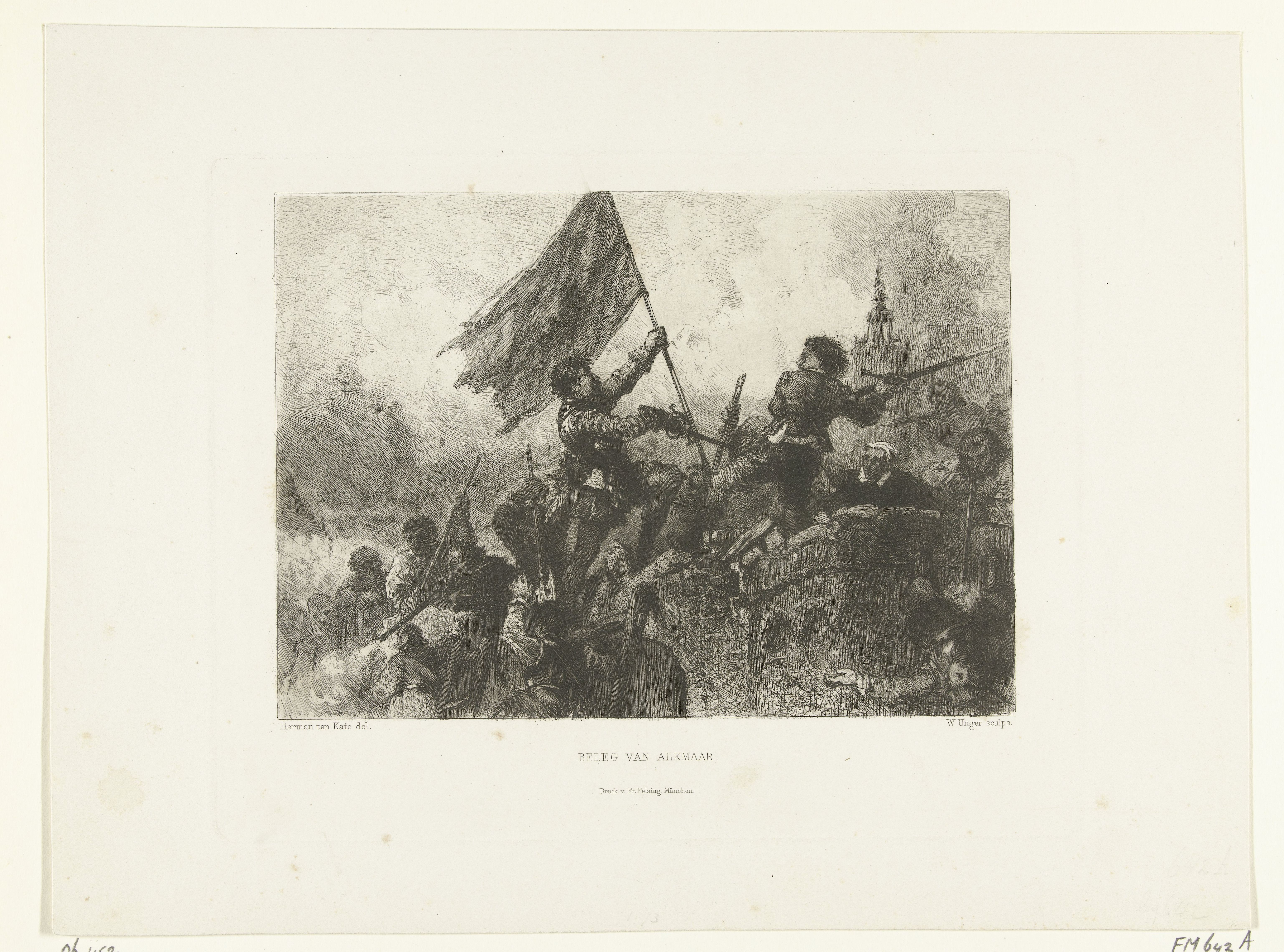 IdentificatieTitel(s): Kitman verovert het Spaanse vaandel, 1573Beleg van Alkmaar (titel op object)Objecttype: prent historieprent Objectnummer: RP-P-1906-452Catalogusreferentie: FMH 642-AOpmerking: toegevoegd nummer RPKAtlas van Stolk 816-7Omschrijving: Kitman verovert het Spaanse vaandel, 1573, scène uit het beleg van van Alkmaar, 1573. Gevechten van man tot man op de muren van de stad.VervaardigingVervaardiger: prentmaker: William Unger (vermeld op object)naar tekening van: Herman Frederik Carel ten Kate (vermeld op object)drukker: Georg Friedrich Felsing (vermeld op object)Plaats vervaardiging: prentmaker: Duitslanddrukker: MünchenDatering: 1871 - 1873Fysieke kenmerken: etsMateriaal: papier Techniek: etsenAfmetingen: plaatrand: h 173 mm × b 218 mmToelichtingGebruikt als illustratie in: In memoriam. Tafereelen uit Hollands tachtig-jarigen strijd. Met etsen van William Unger naar teekeningen van Ch. Rochussen en Herman ten Kate, Haarlem A.C. Kruseman 1873. Verschenen in 10 afleveringen met tekst en afbeelding, nr. 7. Niet in Frederik Muller; door het RPK toegevoegd nummer.OnderwerpWat: beleg, stellingoorlogBeleg van Alkmaar (1573)Wanneer: 1573 - 1573Waar: AlkmaarWie: KitmanVerwerving en rechtenCredit line: Schenking van de heer R.H. May, AmsterdamVerwerving: schenking 1906Copyright: Publiek domein